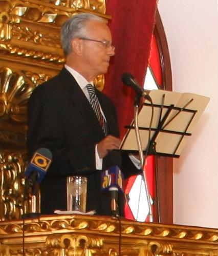 Asdrúbal Baptista dando un discurso